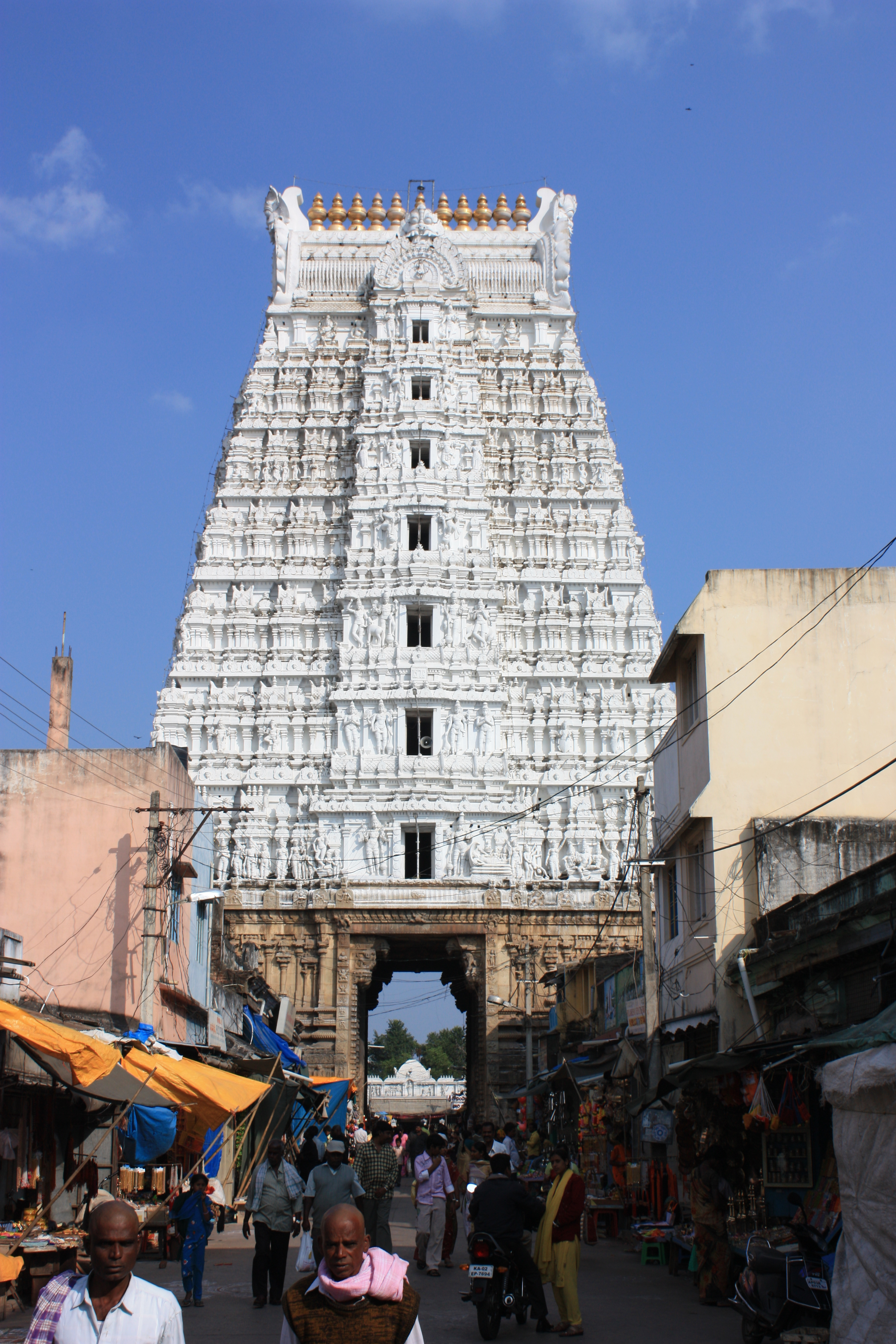 Tirupathi